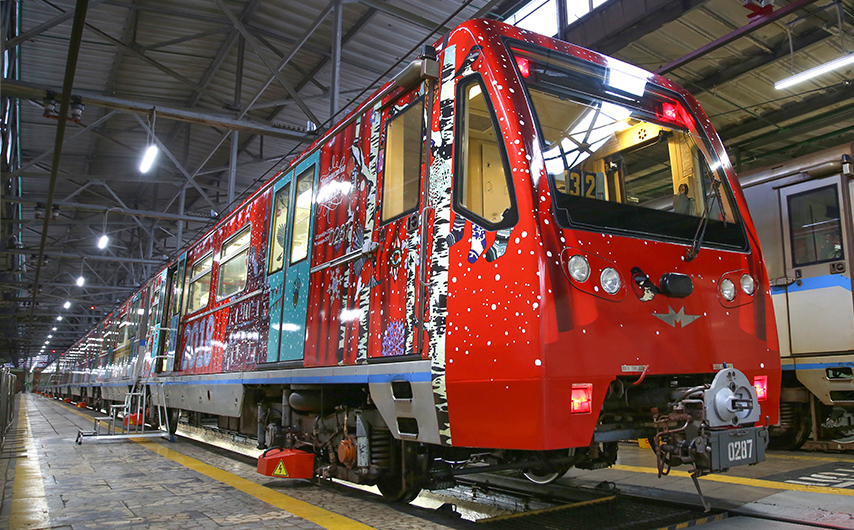 Именной электропоезд метро «Путешествие в Рождество» типа 81-740/741